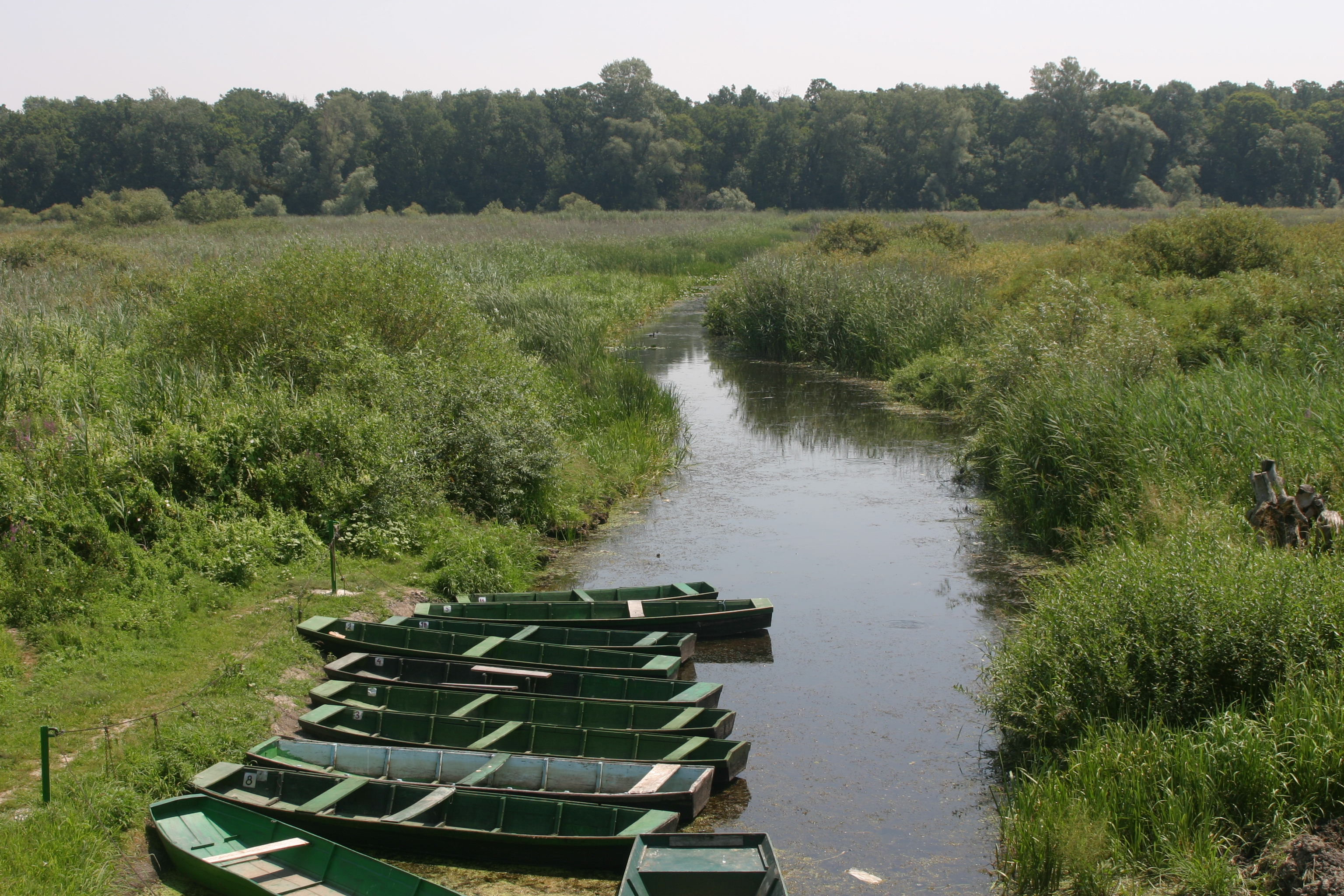 Naravni rezervat Obedska bara pri vasi Obrež, Vojvodina, Srbija